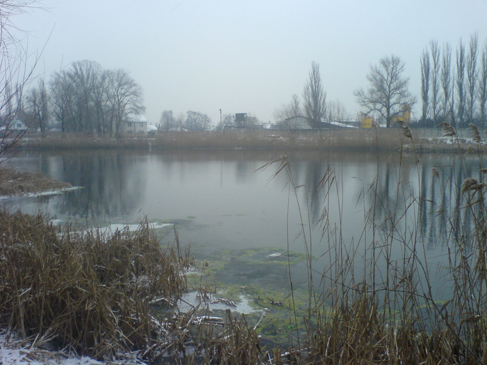 Озеро "Гарячка" в Кременчуге